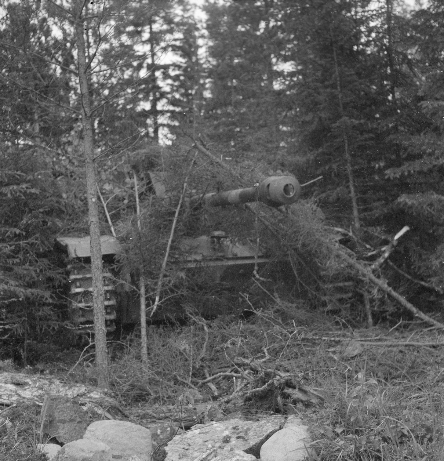 Rynnäkkötykki Sturmgeschütz III on piilotettu maastoon.